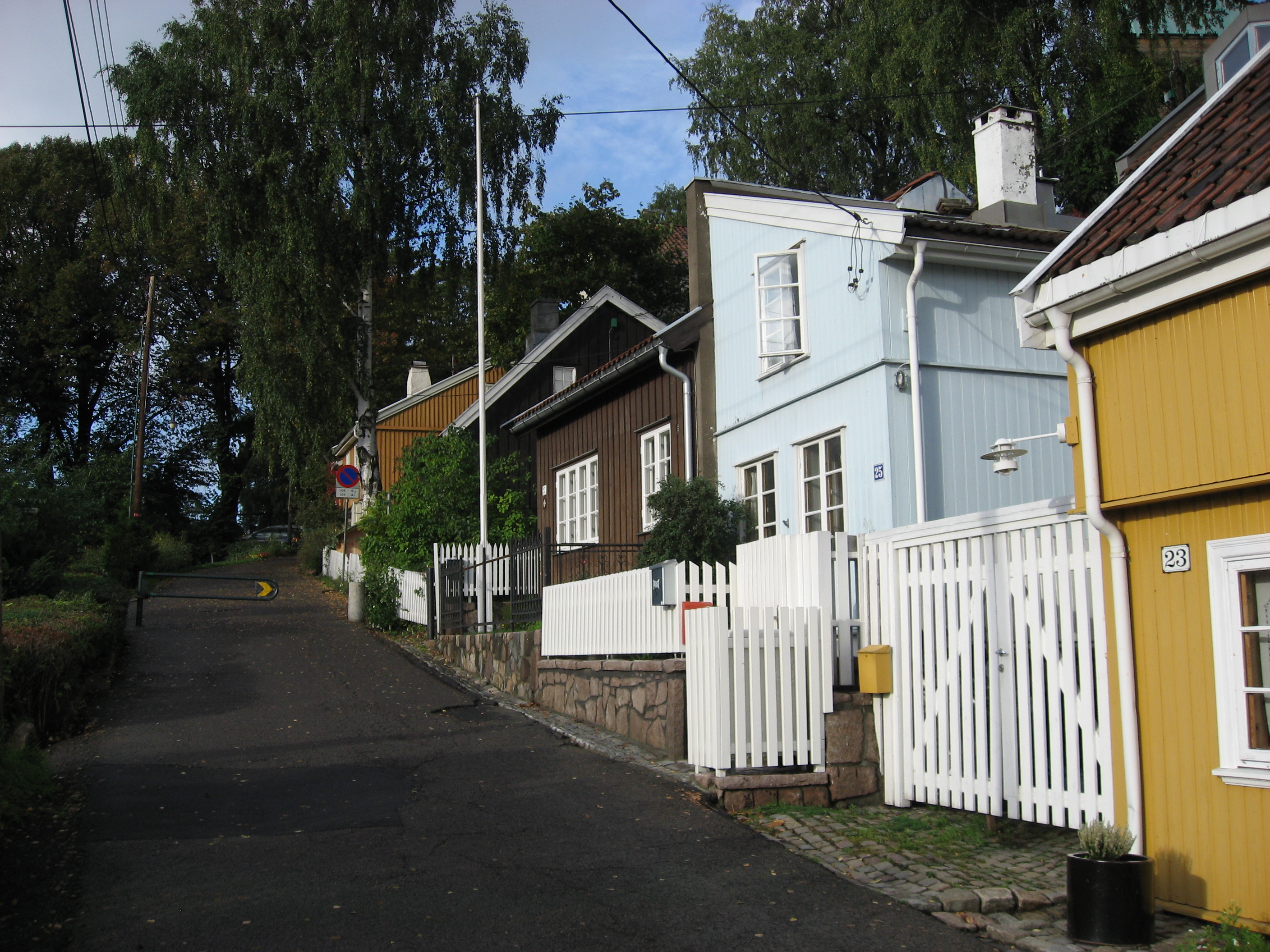 Telthusbakken, a street in Oslo, Norway.